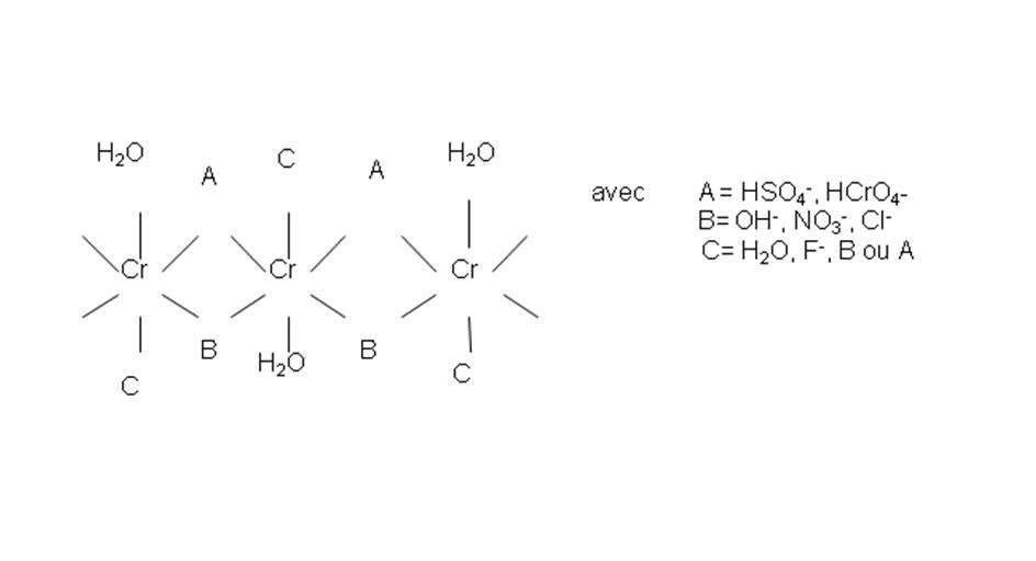 chrome hexavalent